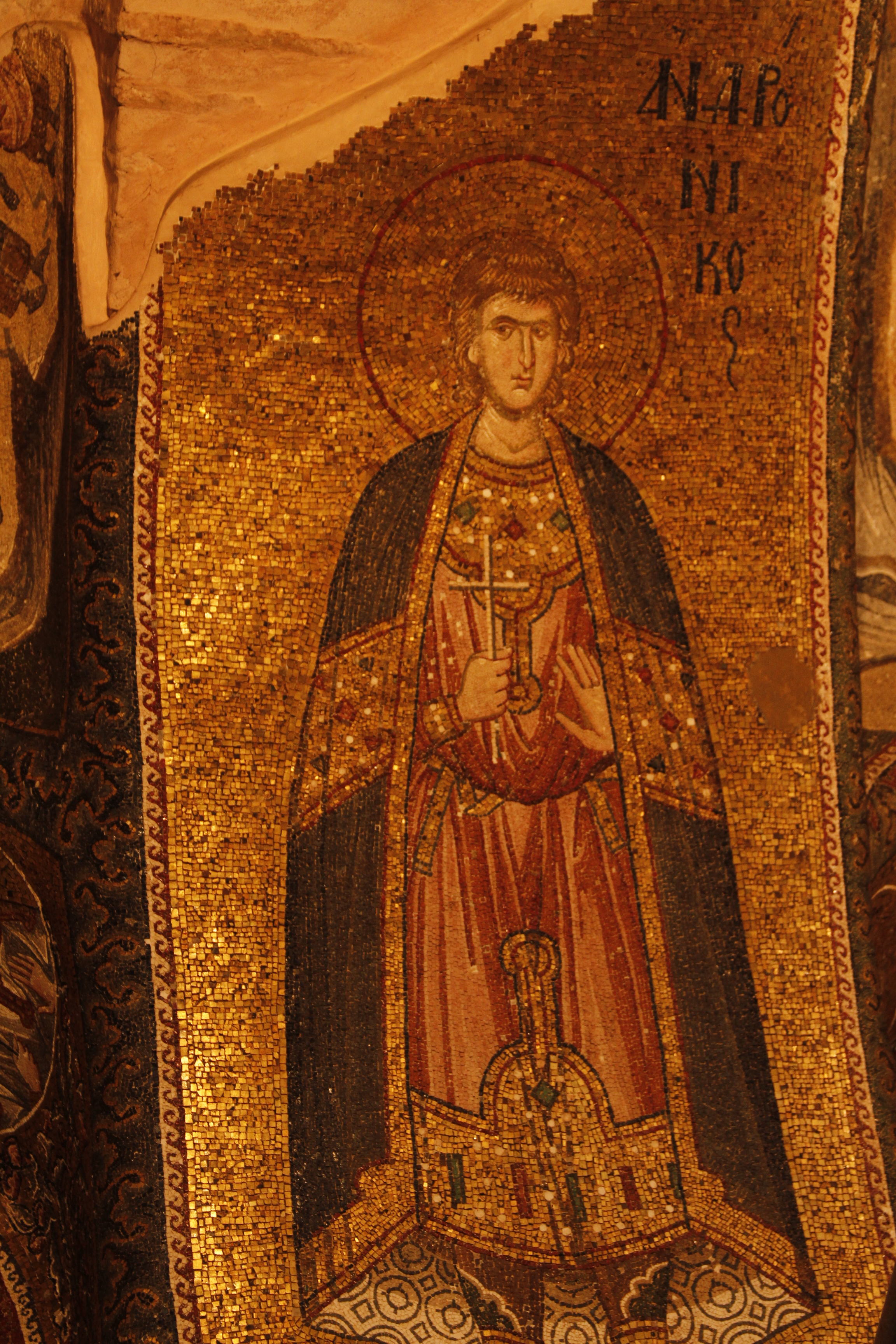 Mosaico de Santo Andrônico de Tarso na Cilícia em Chora